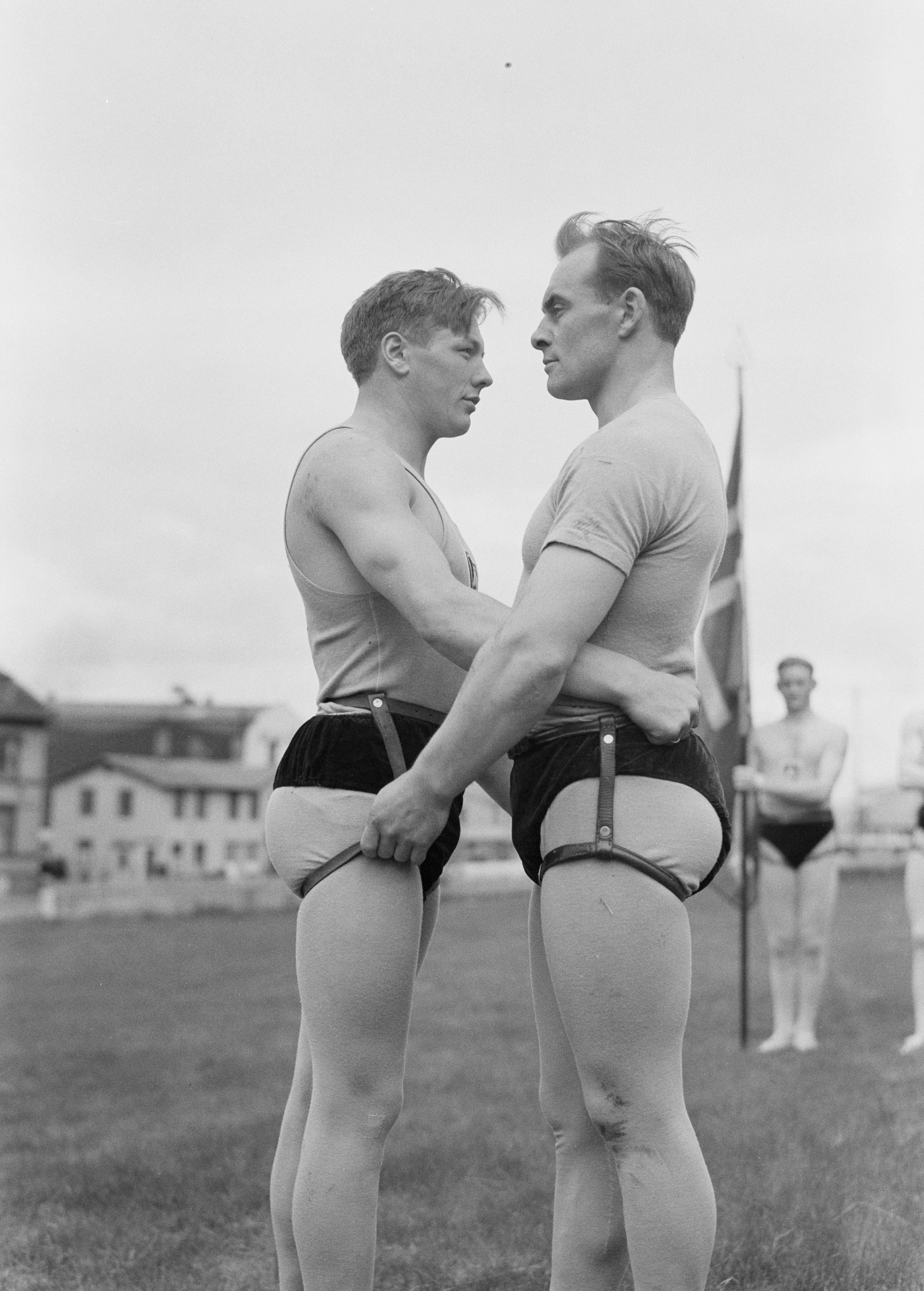 Collectie / Archief : Fotocollectie Van de Poll Reportage / Serie : IJsland Beschrijving : Reykjavik. IJslands worstelen (Glima): twee leden van het glimateam van de Menntaskolinn in aanvalshouding Datum : 1934 Locatie : IJsland, Reykjavik Trefwoorden : scholen, sportverenigingen, vecht- en verdedigingssporten, worstelen Fotograaf : Poll, Willem van de Auteursrechthebbende : Nationaal Archief Materiaalsoort : Glasnegatief Nummer archiefinventaris : bekijk toegang 2.24.14.02 Bestanddeelnummer : 190-0264